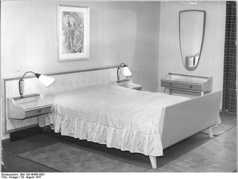 Schlafzimmer, VEB Möbelwerke Zeulenroda Zentralbild Krueger Leipzig We-Nea 28.8.1957 Leipziger Herbstmesse 1957. UBz: Der VEB Ostthüringer Möbelwerke Zeulenroda zeigt im Unions-Messehaus als Neuentwicklung ein Schlafzimmer, Birke-poliert mit Plastikfolien-Überzug.